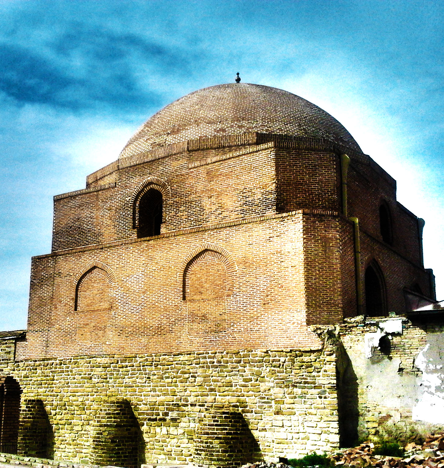 تۆرکجه: احمد محمدی